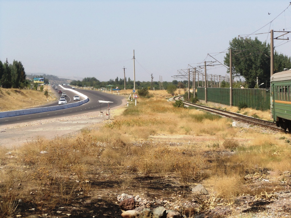 Бостанлыкский район